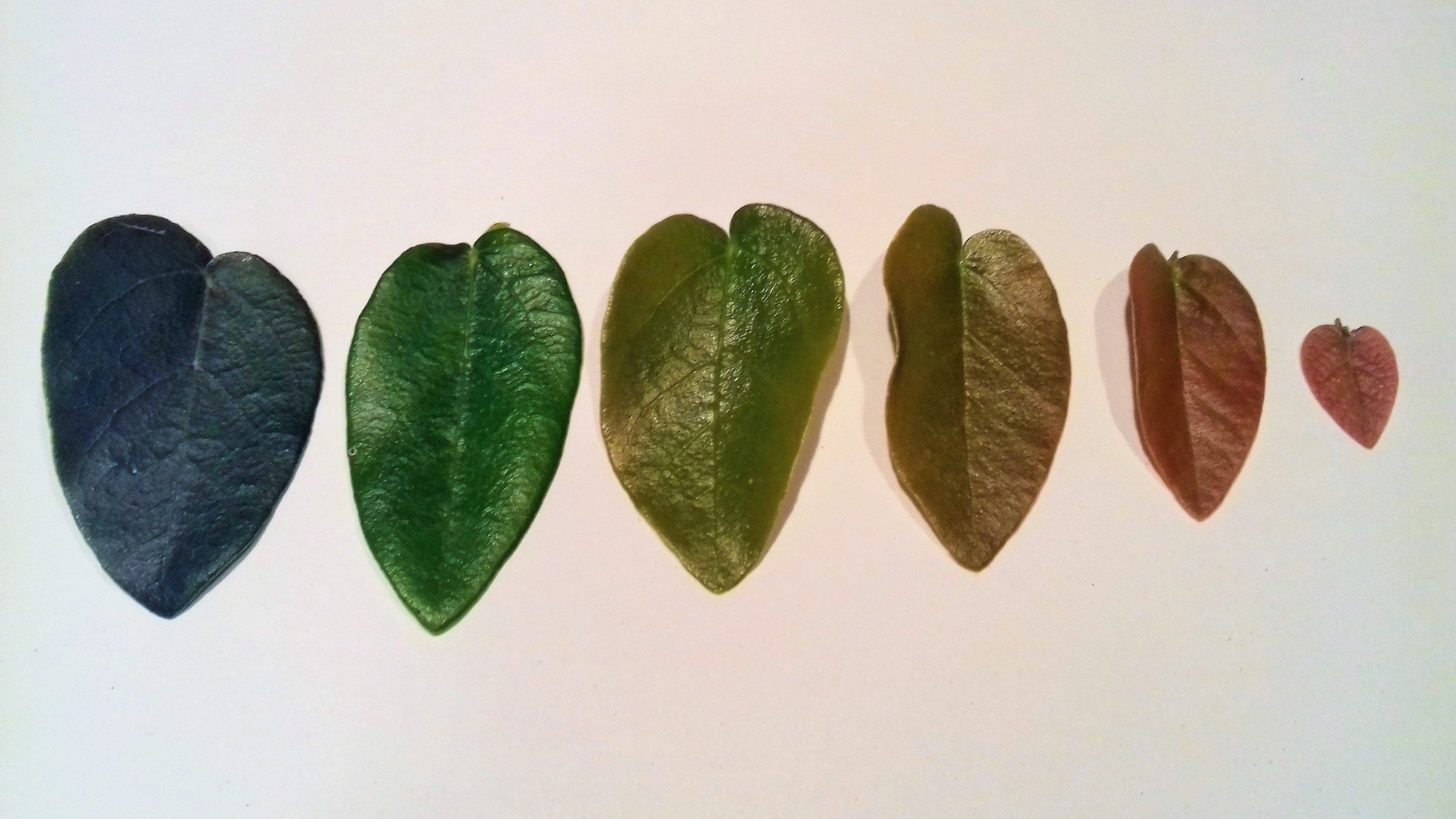 Feuilles de Ficus pumila, de la plus ancienne à la plus jeune. Feuilles récoltées dans le quartier du 6ème kilomètre, à Nouméa, Province Sud, Nouvelle-Calédonie.